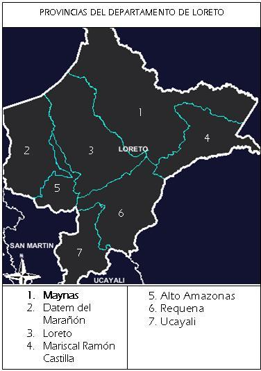 División política de region Loreto. loreto prov. 33